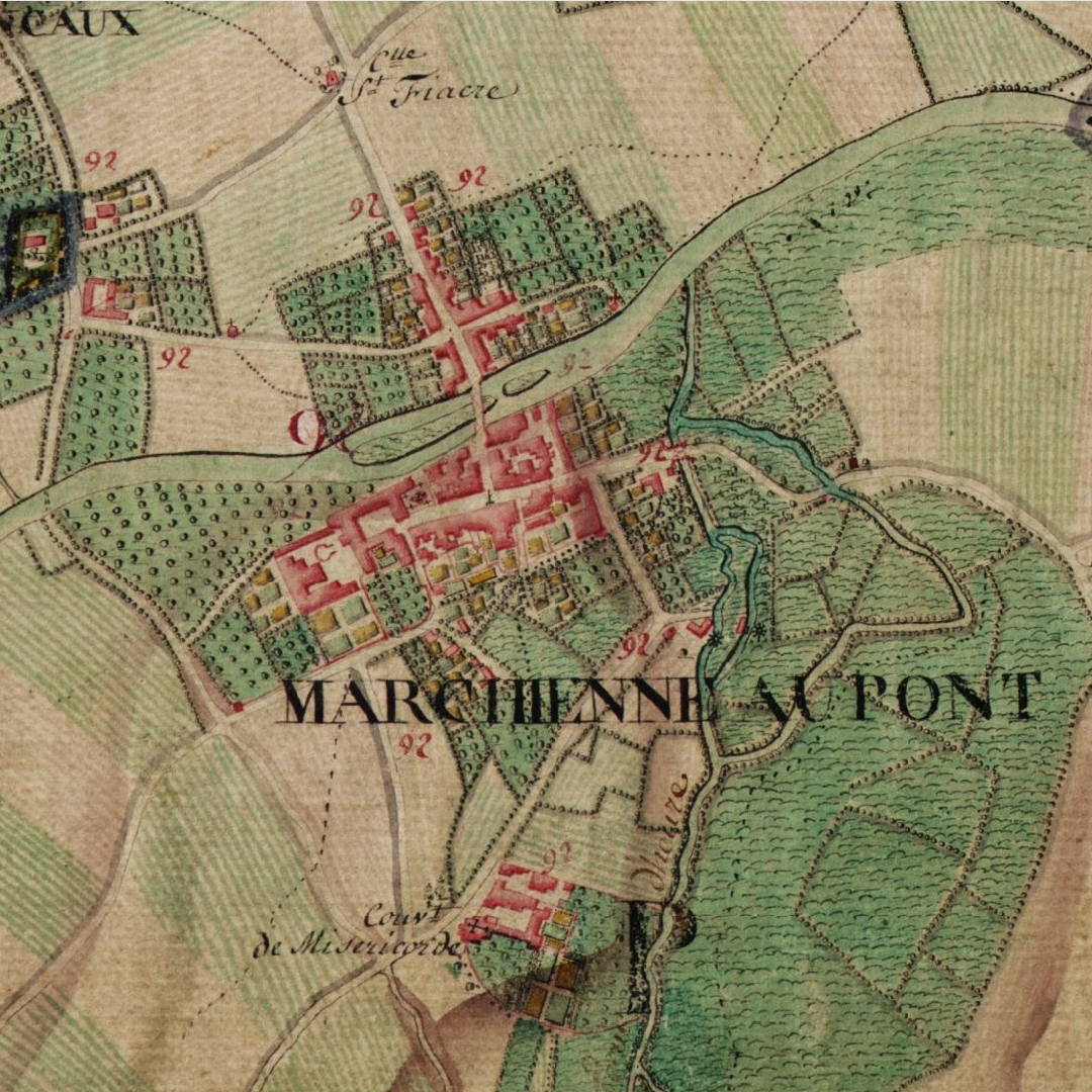 Marchienne-au-Pont (Charleroi - Belgique) Carte de Cabinet des Pays-Bas autrichiens La carte de Cabinet des Pays-Bas autrichiens a été levée sous la direction du comte de Ferraris entre 1770 et 1777. Il s'agit d'un document militaire réalisé en trois exemplaires et dont l'échelle originale est 1 / 11 520. La carte est entièrement manuscrite et procède de levers sur le terrain.